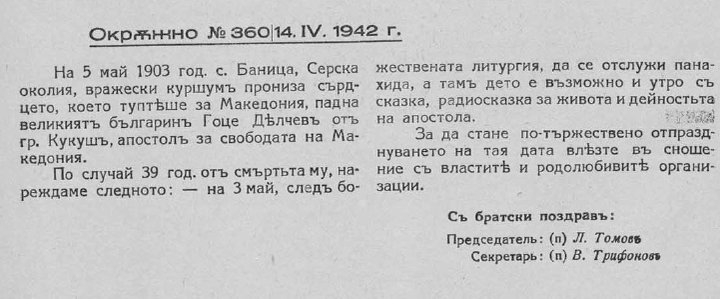 Окръжно на Илинденската организация, подписано от Лазар Томов и Васил Трифонов.